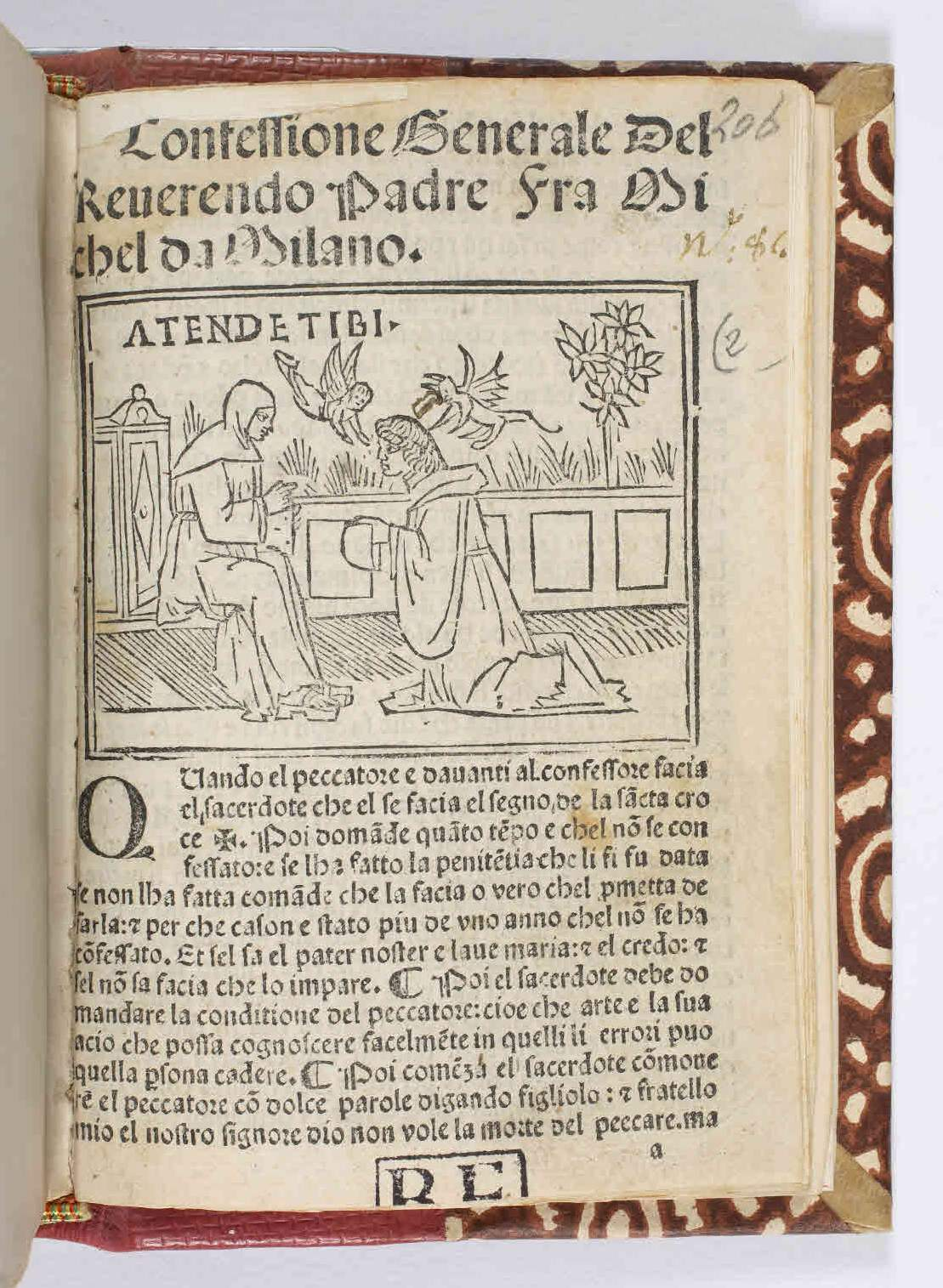 Confessionale (italiano). - [Venezia] : [Otino Luna], 1500. - 16 c. ; a-b⁸ ; 8°.